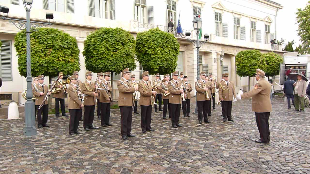 Katonazenekar a Sándor Palota előtt (Budapest). Schmitt Pál köztársasági elnök a déli harangszó után írta alá a Sándor Palotában az Országgyűlés által egy héttel korábban elfogadott új alaptörvényt